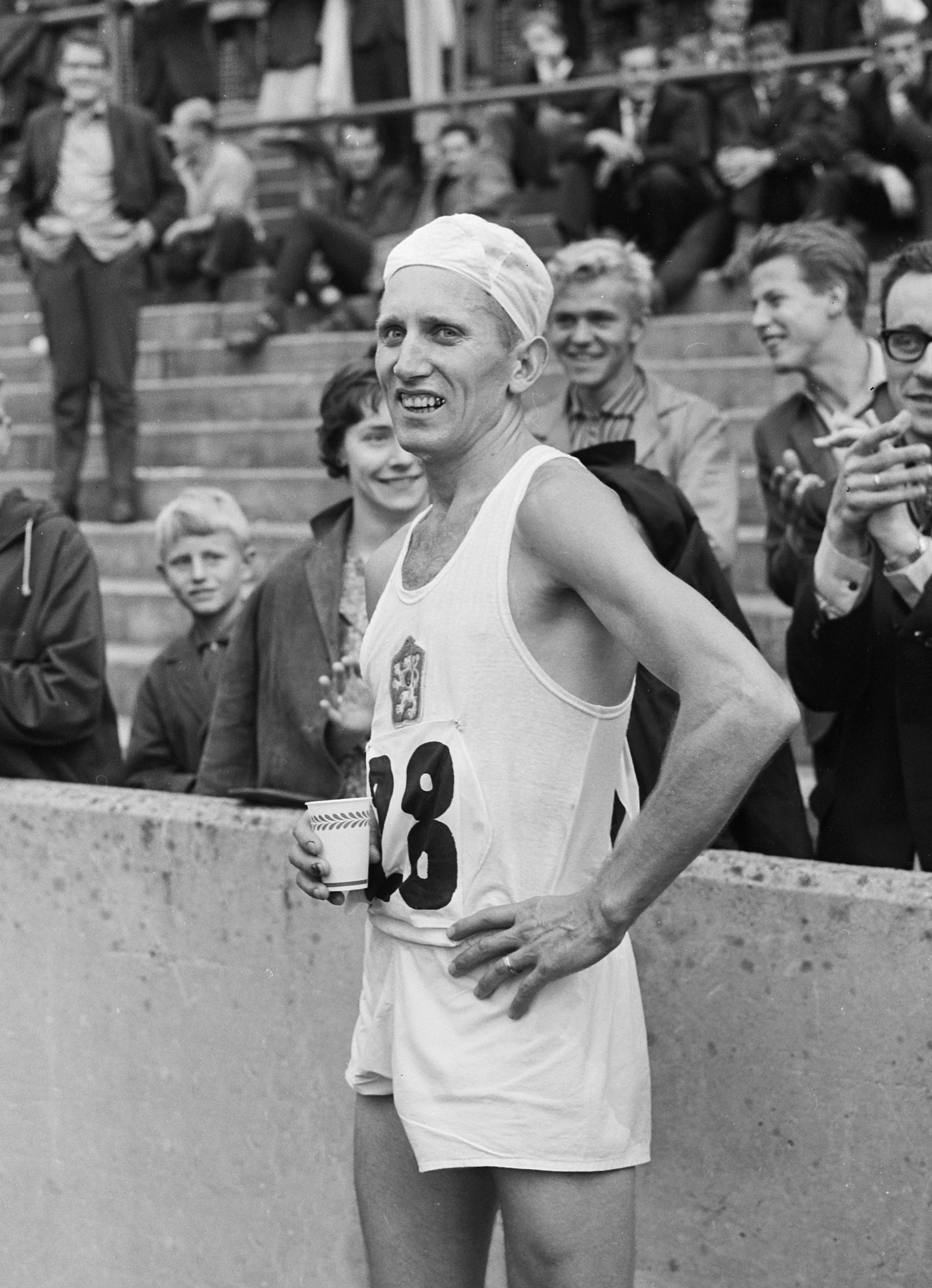 Huldiging marathon. Varlav Chudomel